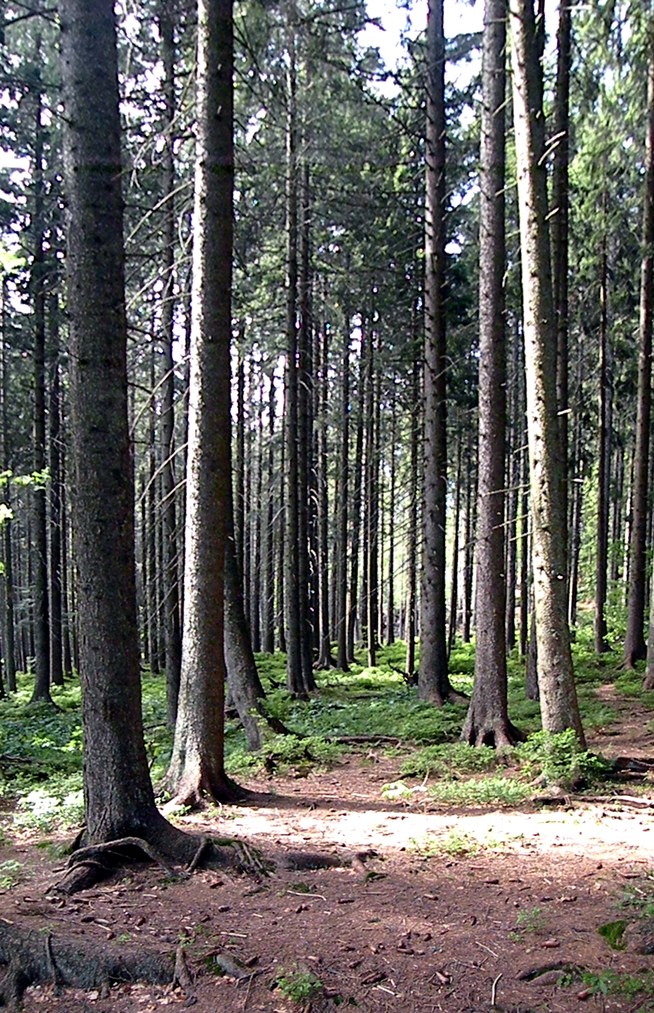 Девственный реликтовый лес у Арберзее. Баварский лес.